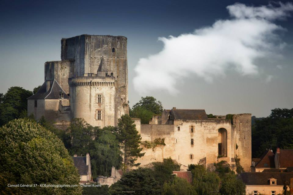 Vue du donjon depuis l'ouest